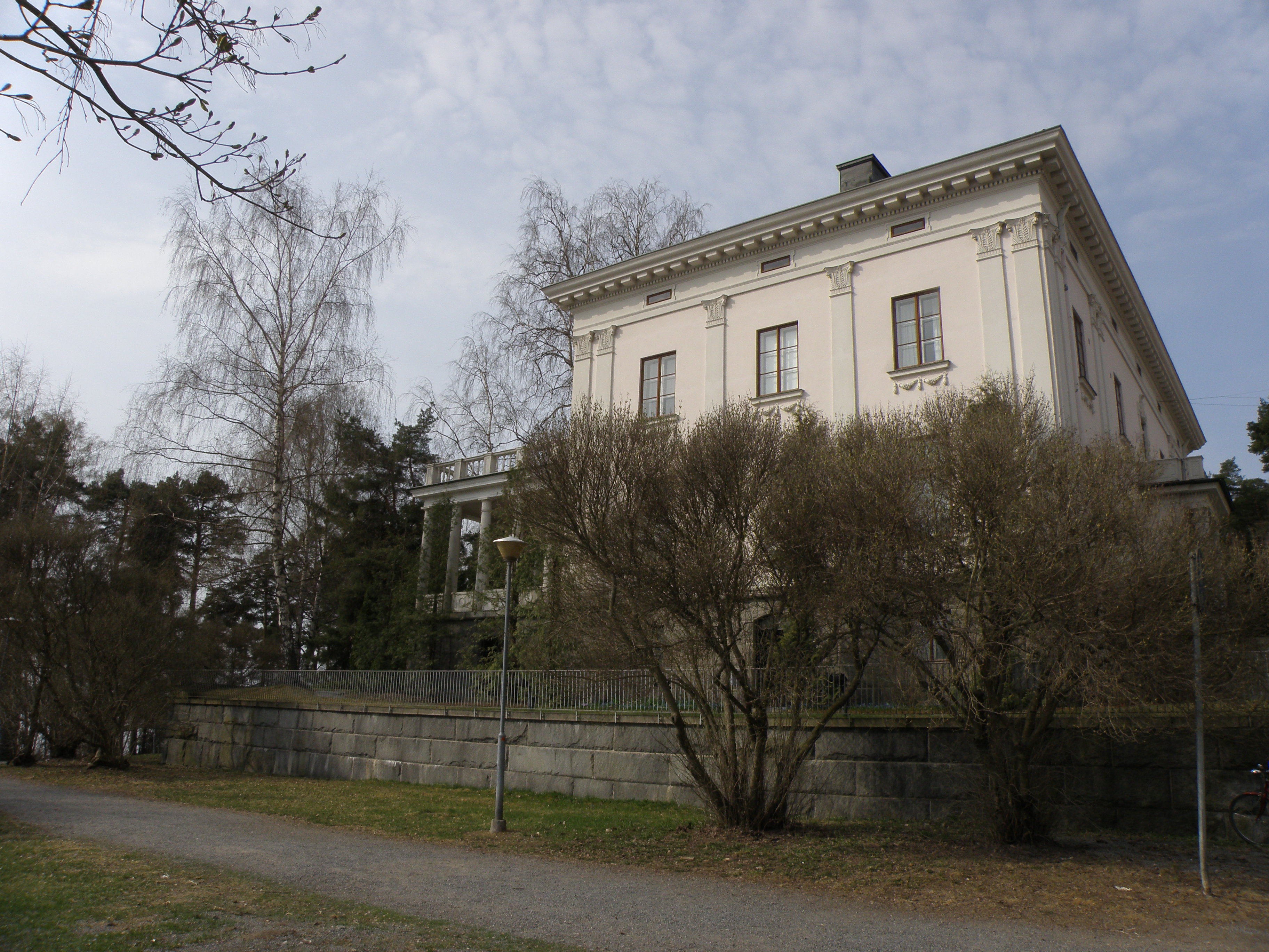 Pyynikin linna